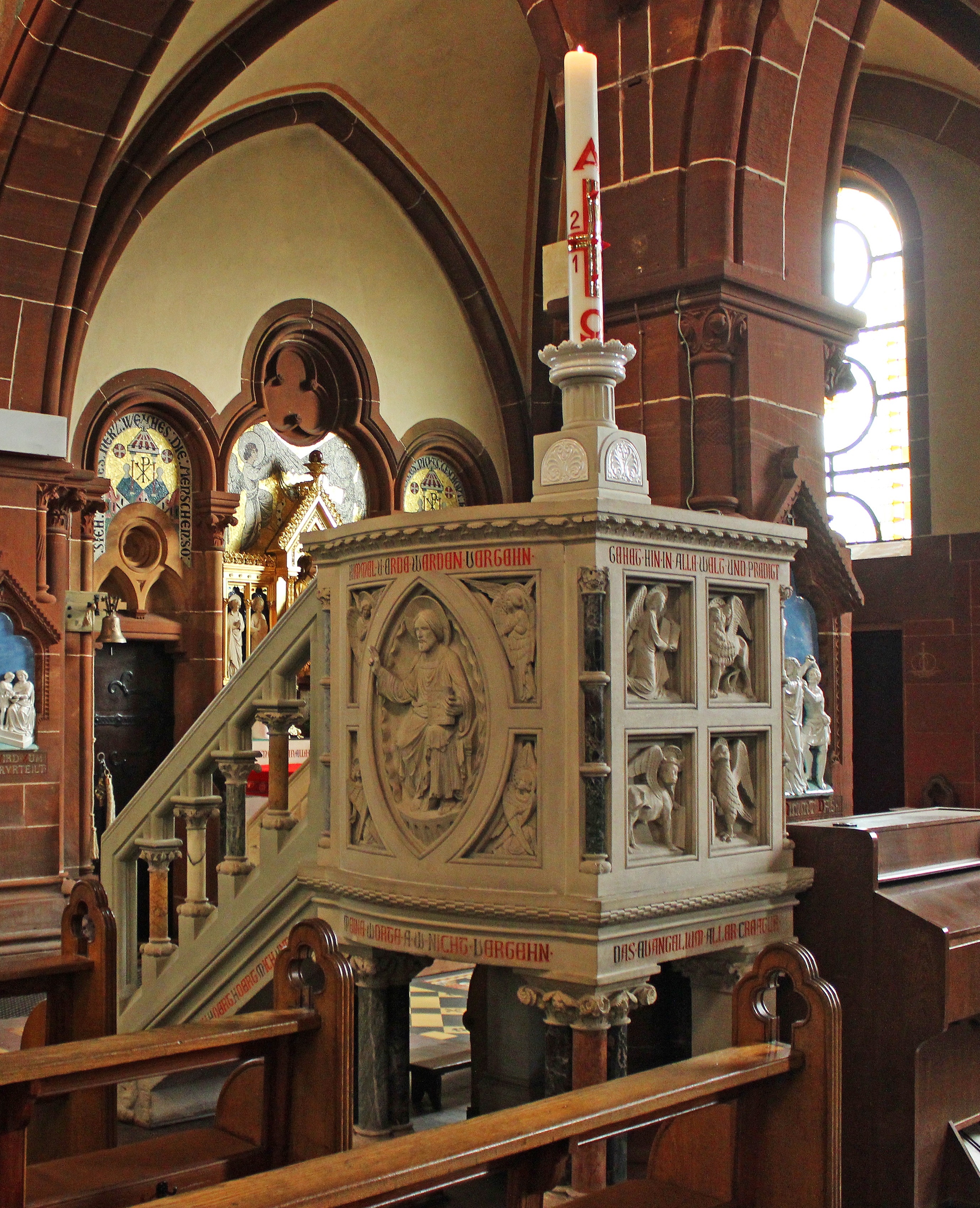 Kanzel der katholischen Pfarr- und Wallfahrtskirche St. Lutwinus in Mettlach, Landkreis Merzig-Wadern, Saarland